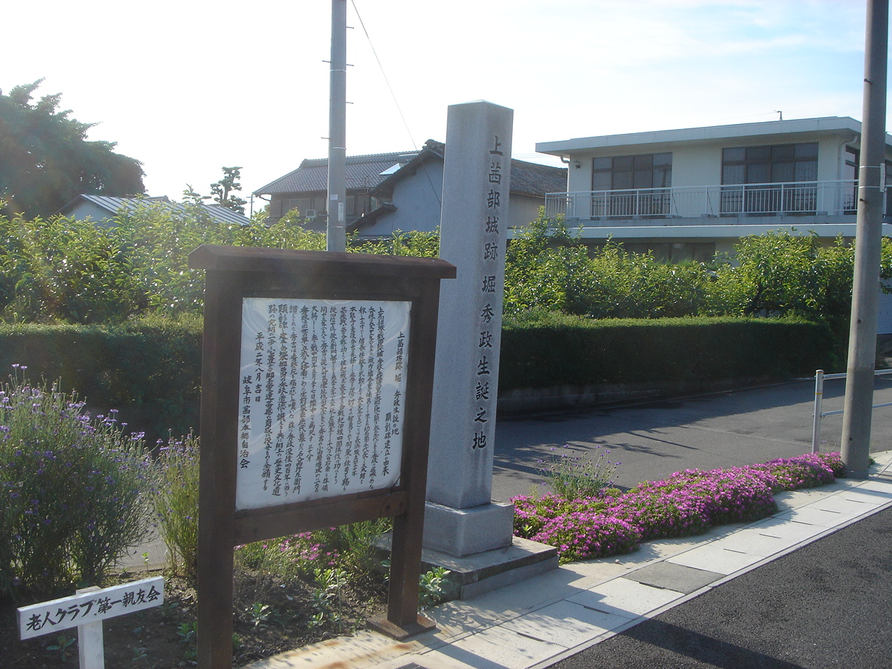 Kami akanebe jyo (跡に建つ石碑), Gifu, Gifu, Japan (岐阜県岐阜市) で撮影。国道21号と国道157号の交差点北の国道157号沿い歩道にある。